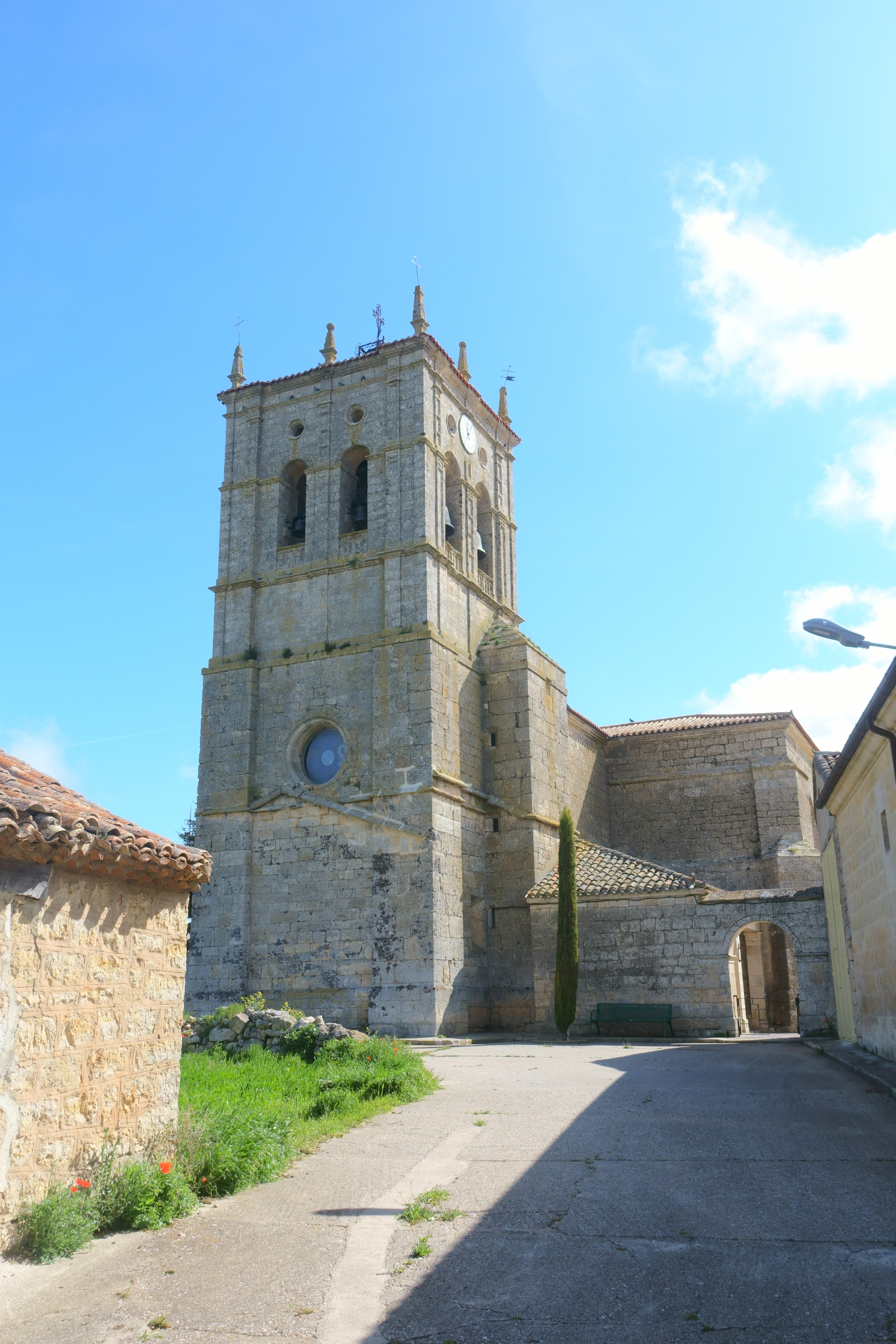 Iglesia de San Pedro, Pedrosa del Páramo (Burgos, España).